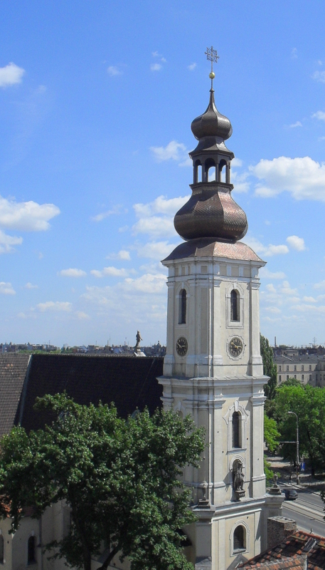 Wrocław, kościół par. p.w. św. Maurycego, 2 poł. XIII, 1723, 1897-1899